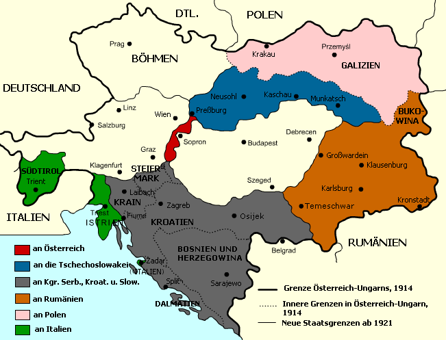 Trianon-Karte, mit den Gebietsverlusten Österreich-Ungarns, und den neuen Staatsgrenzen in Mittel- und Osteuropa ab 1920/1921.